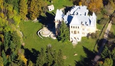 Castelul Poiana Florilor